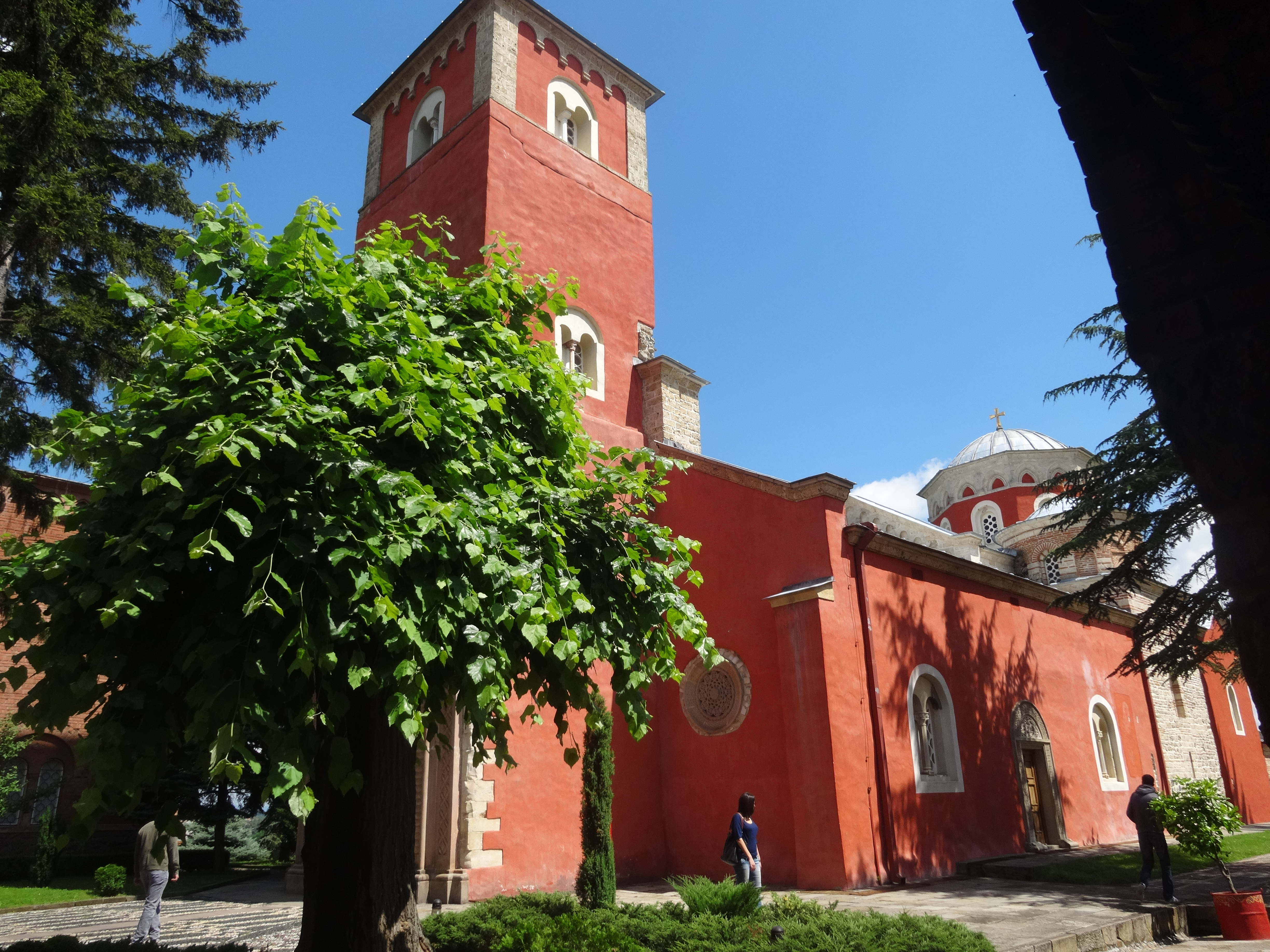 Жича је српски средњовековни манастир из прве половине 13. века, који се налази у близини Краљева. Подигао ју је први краљ Србије, Стефан Немањић.